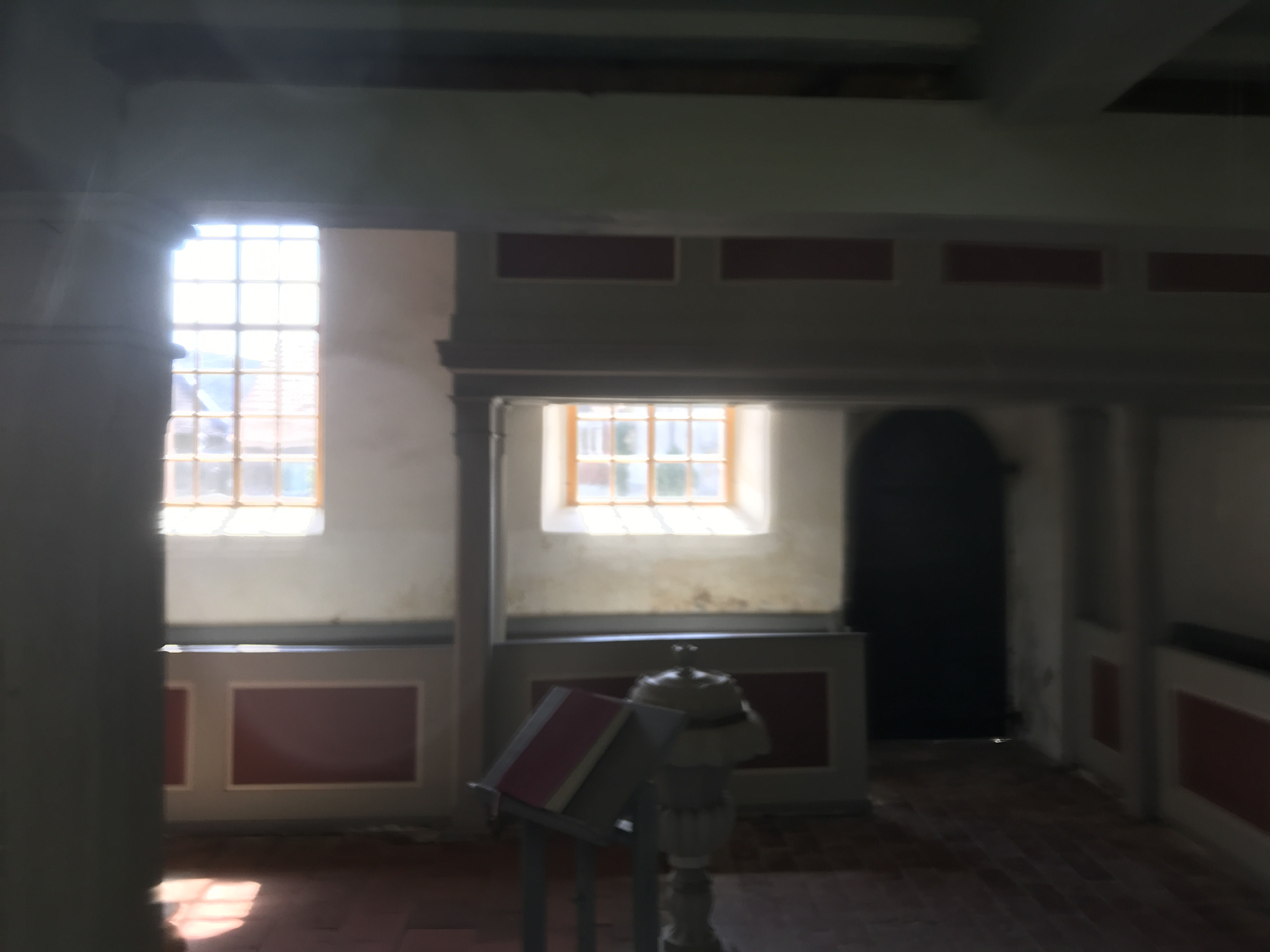 Die Dorfkirche in Zöllmersdorf der Stadt Luckau entstand um 1300 und wurde 1911 erheblich umgebaut.